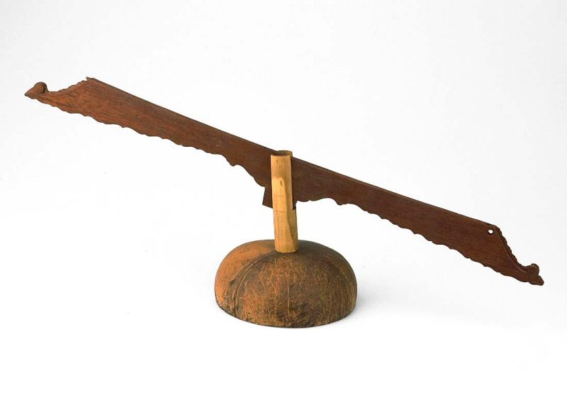 Tokkelinstrument. Staafciter met één snaar Unknown language: Sulepe